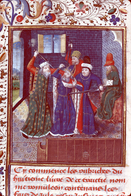 Besançon-BM-ms. 0850, f186 Romuléon-Assassinat de César